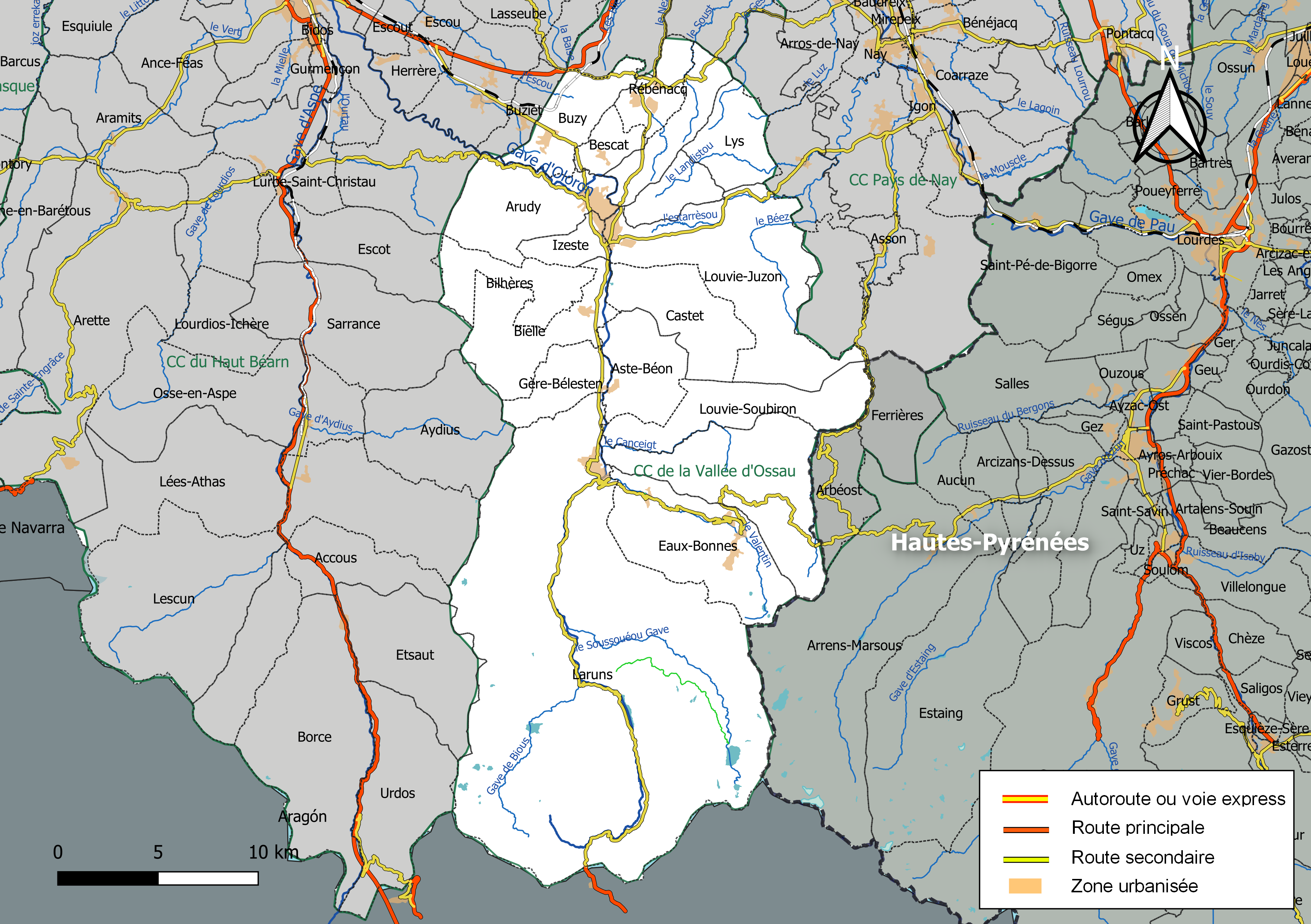 Carte géographique de la Communauté de communes de la Vallée d'Ossau, département des Pyrénées-Atlantiques, France. Composition au 1er janvier 2019.